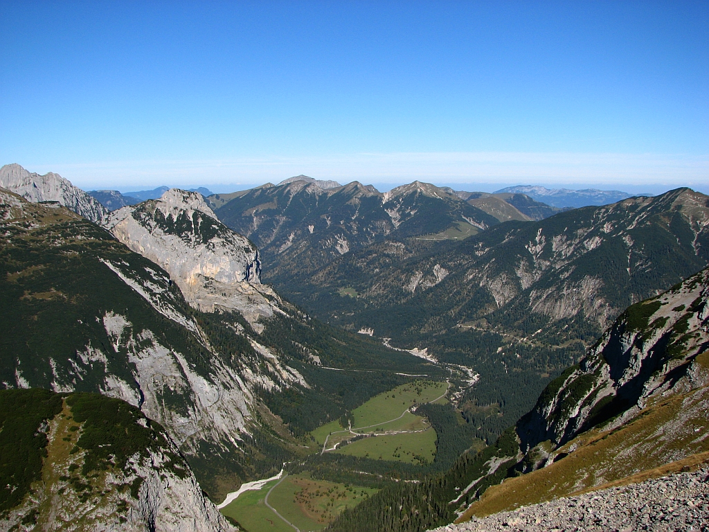 Grasbergkamm und Ahornboden